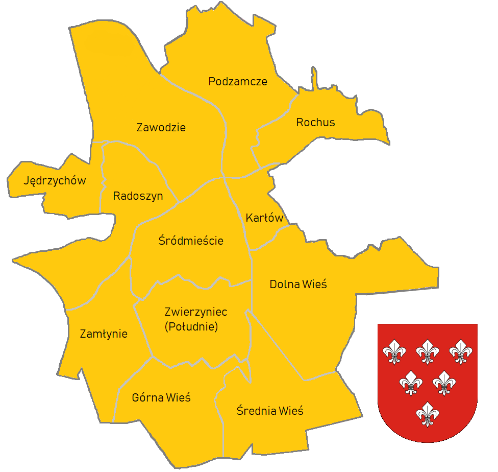 Zwyczajowy podział miasta na dzielnice